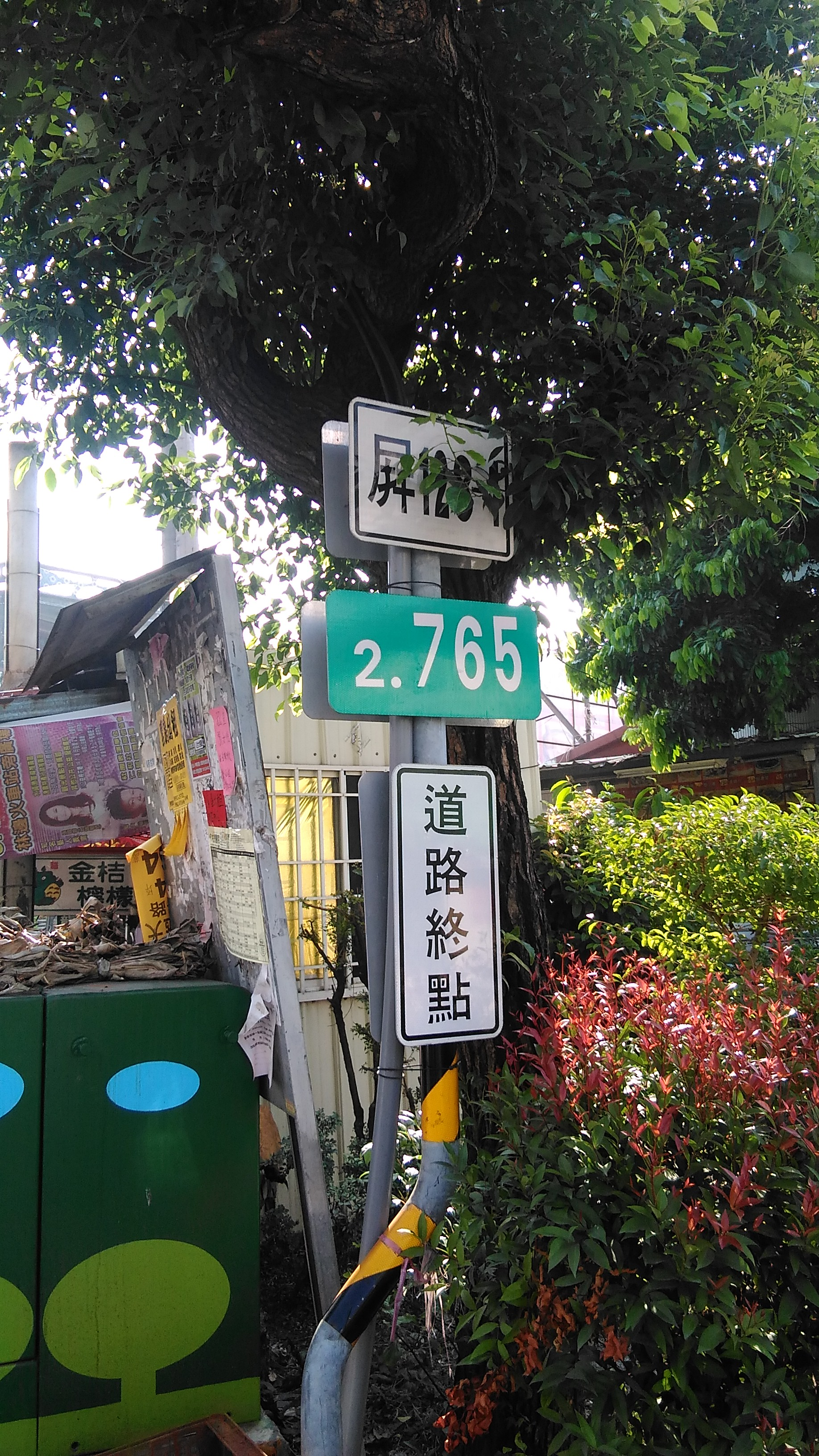 原屏128-1線的終點小牌，現位於屏128線起點旁。鄉道屏128-1線已於2016年全線併入鄉道屏128線。